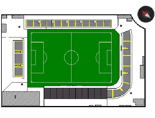 pianta dello Stadio Franco Fanuzzi di Brindisi